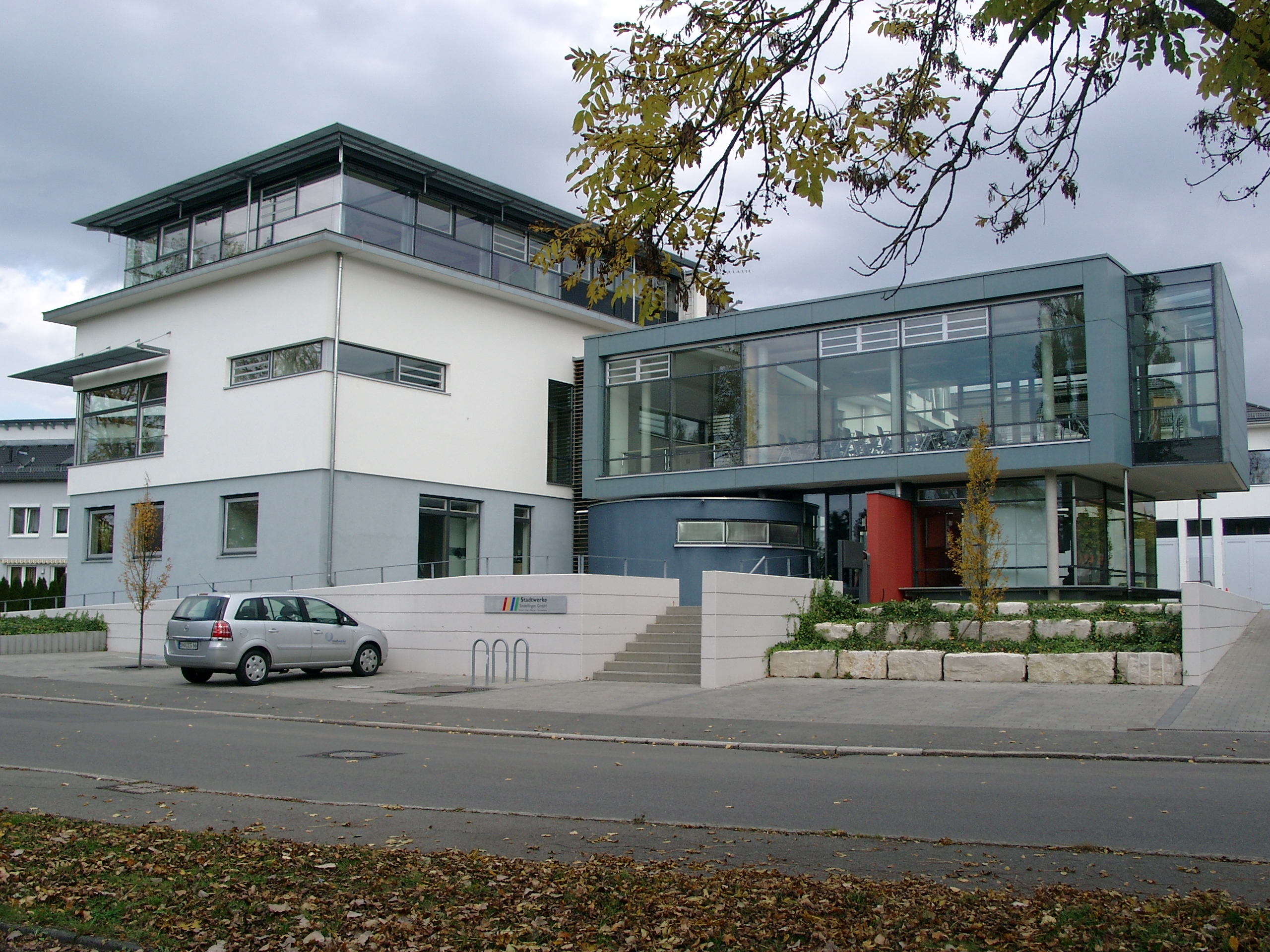 Stadtwerke Sindelfingen. Hauptgebäude in der Rosenstrasse.